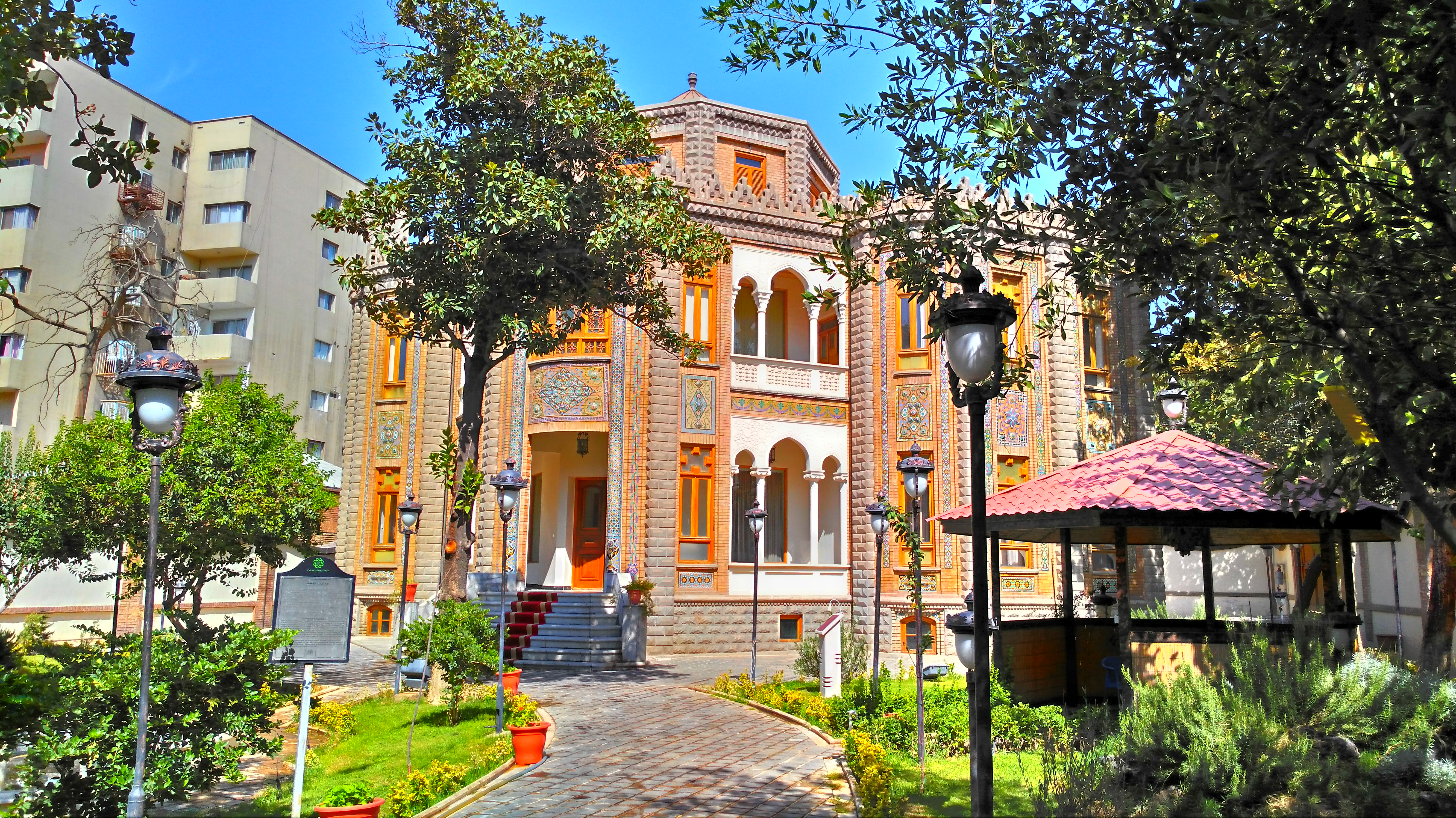 ساختمان کوشک